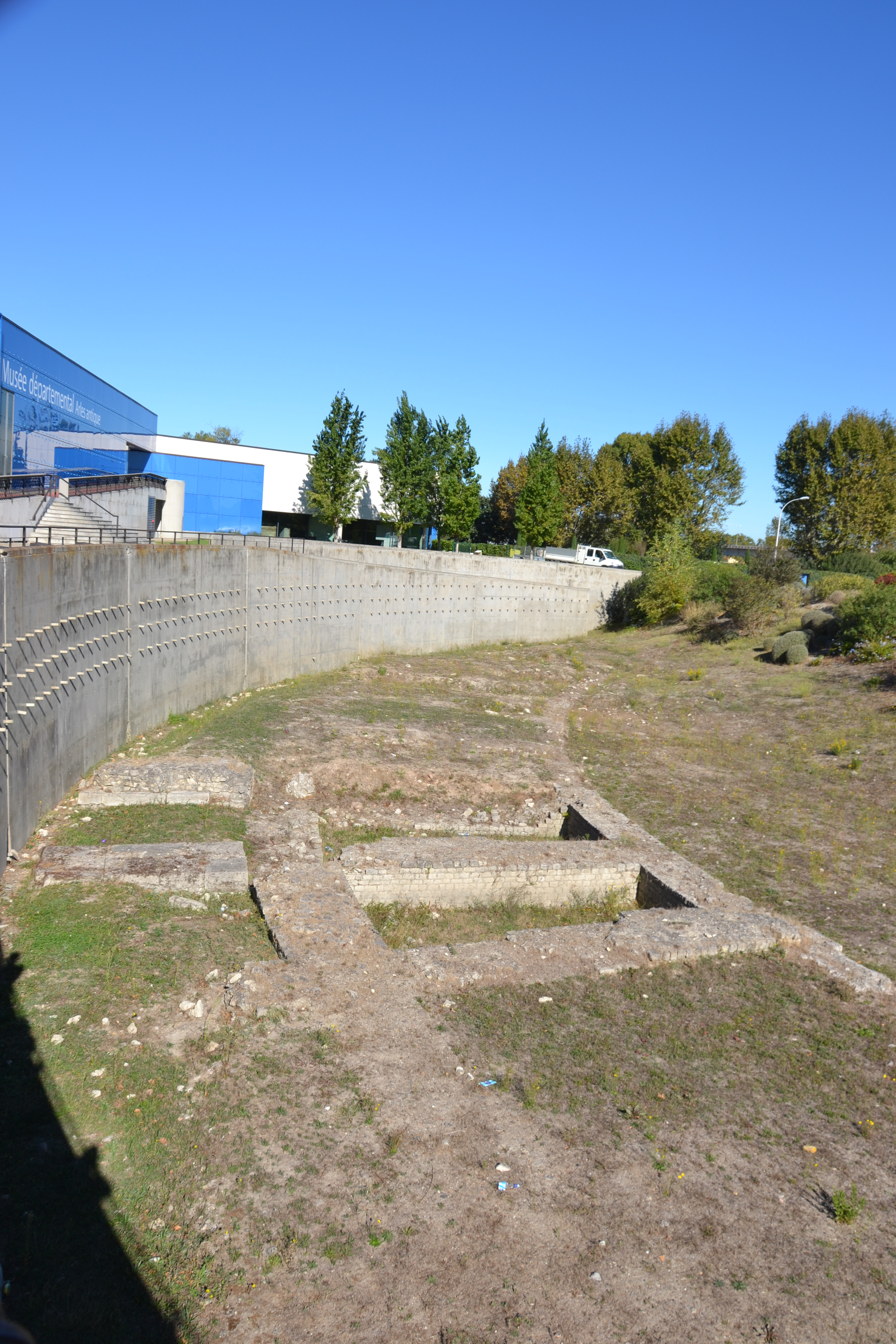 ruine des fondations du cirque d'Arles